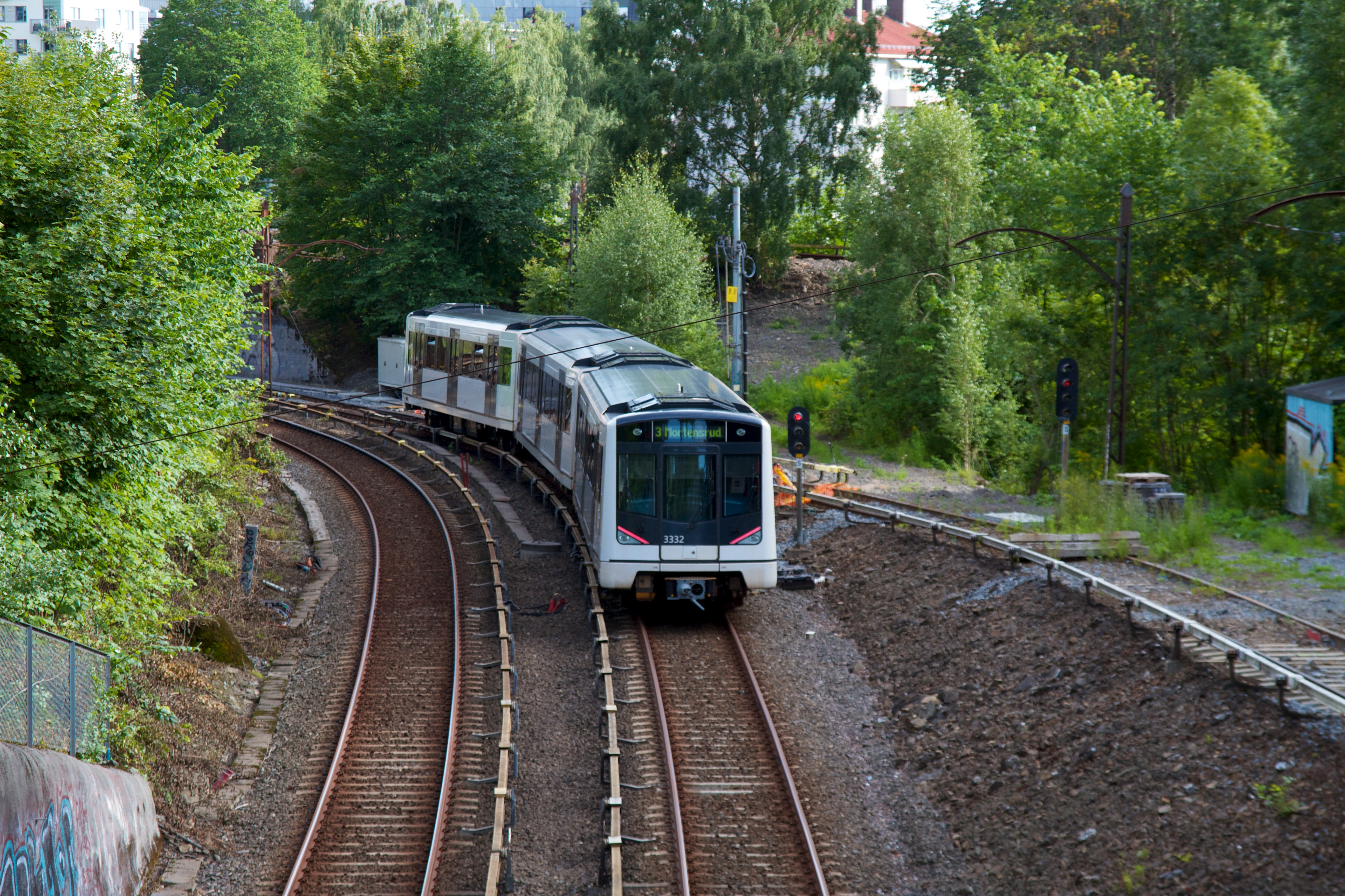 T-banetog ved Frøen stasjon